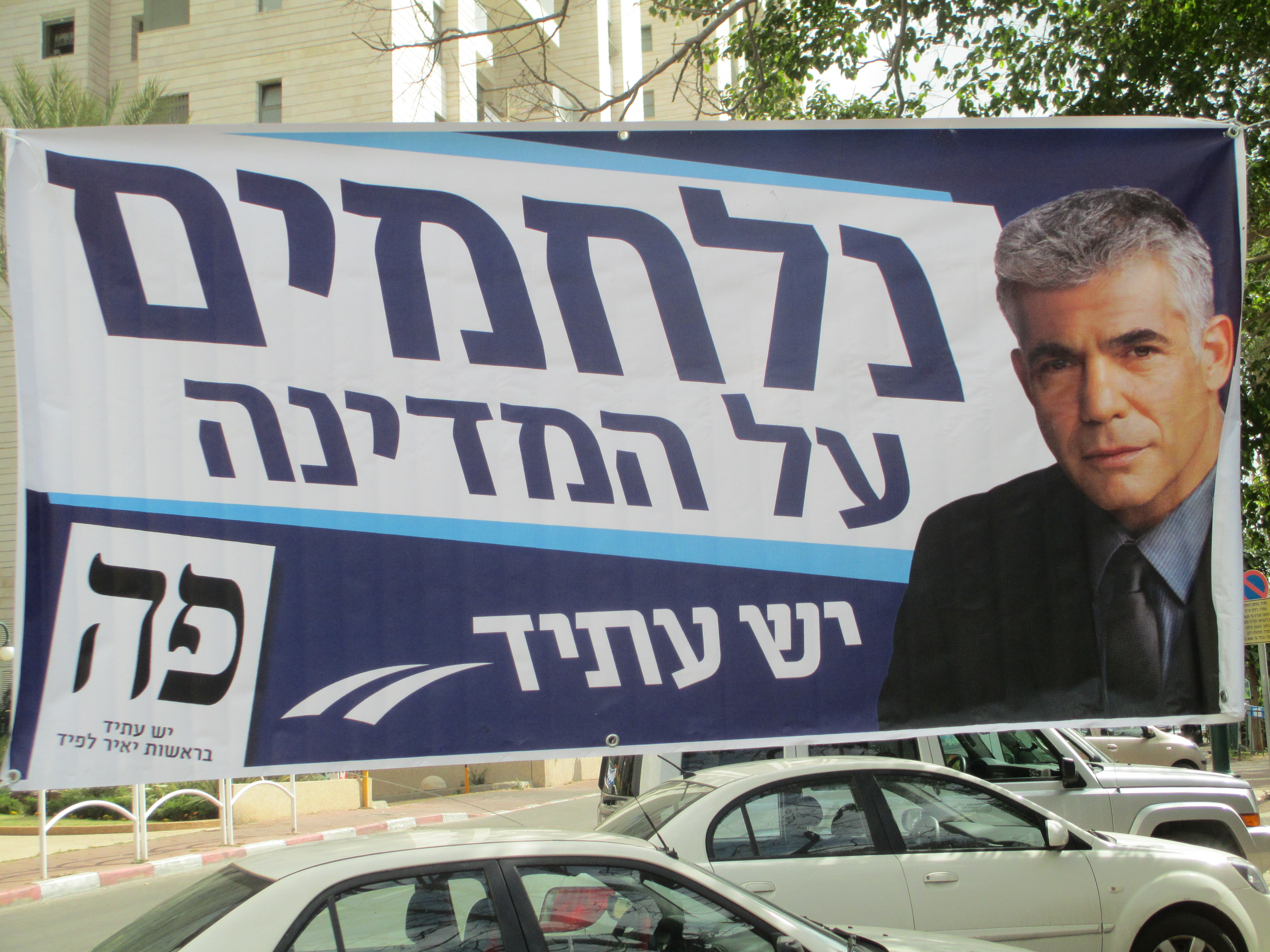 כרזת בחירות של "יש עתיד", בחירות 2015